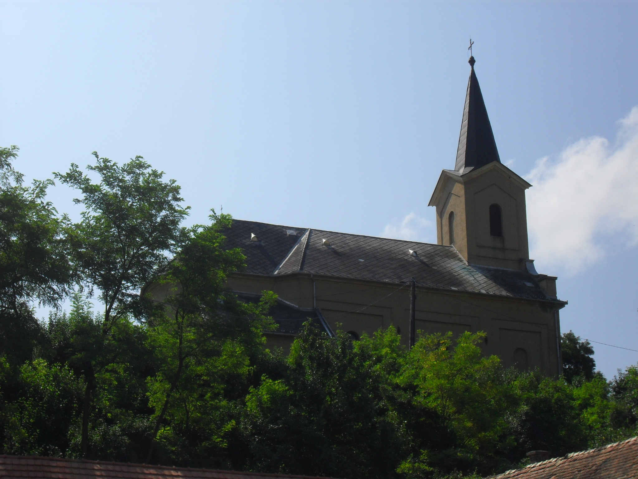 Karancsalja - Szent Miklós római katolikus templom